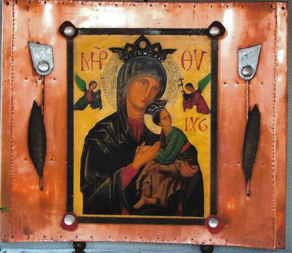 Foto vom Marienbild der Marienkapelle von St. Josef Kupferdreh